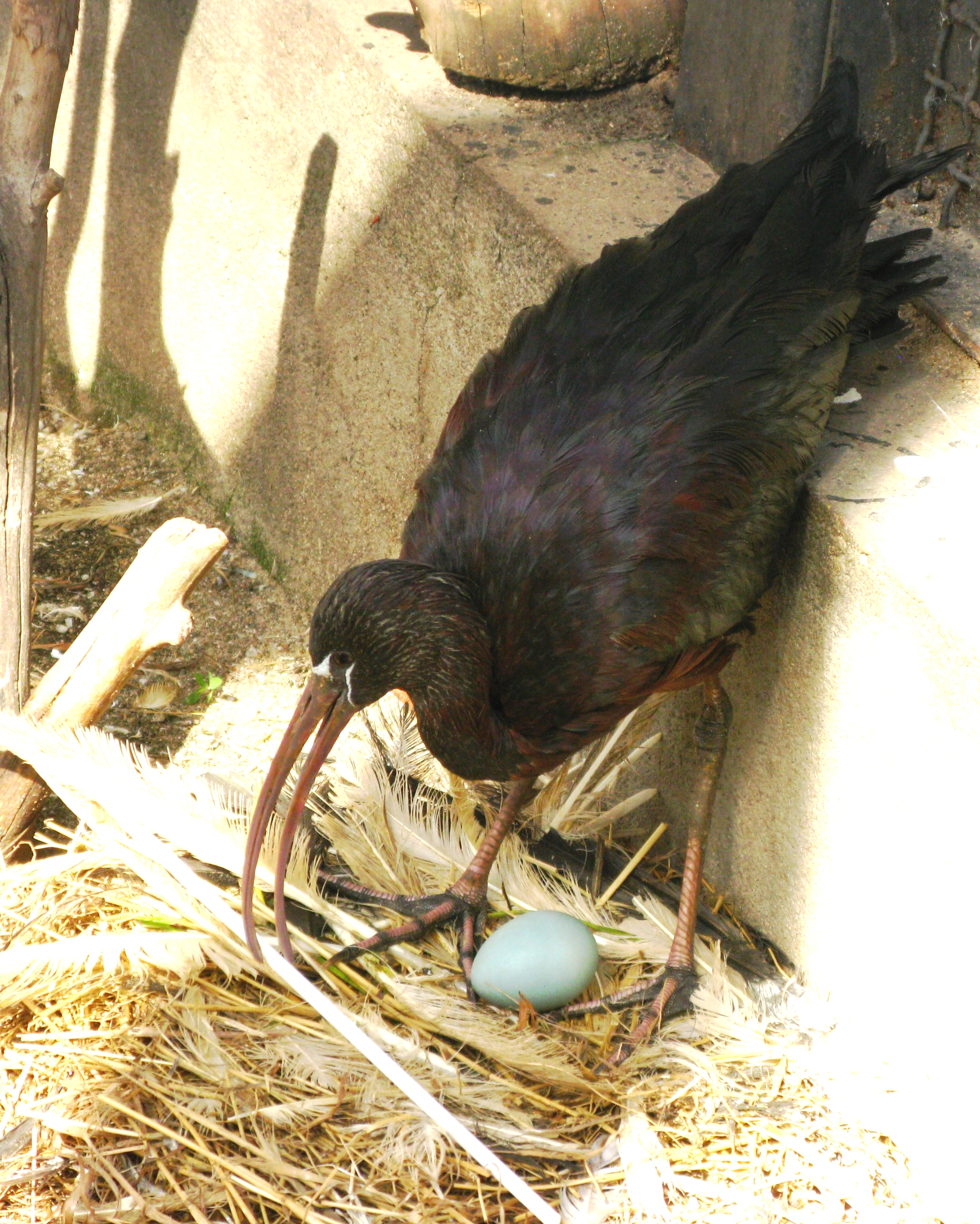 Каравайка (Plegadis falcinellus) в зоопарке города Гродно, Беларусь.